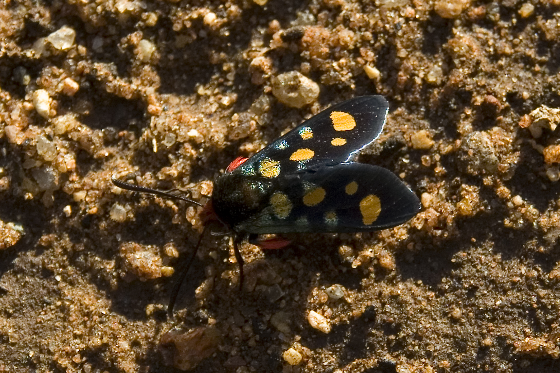 Arniocera auriguttata